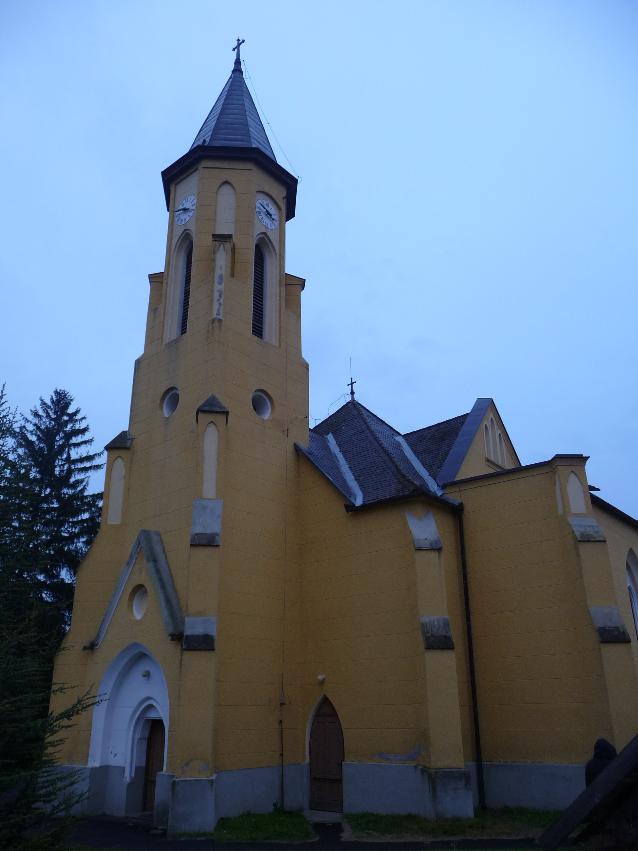 Az alsózsidi templom nyugat-délnyugatról, Várvölgy